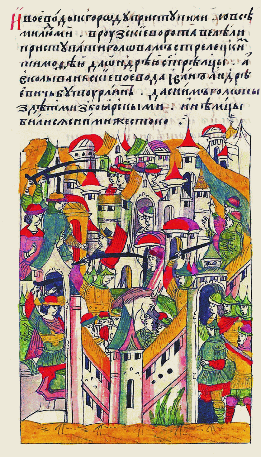 И воеводы приступили к городу со всеми людьми, к Рузским воротам велели приступать головам стрелецким Тимофею и Андрею со стрельцами, а к Колыванским воротам приступили воевода Иван Андреевич Бутурлин и с ним головы с боярскими детьми; и немцы жестоко бились с ними